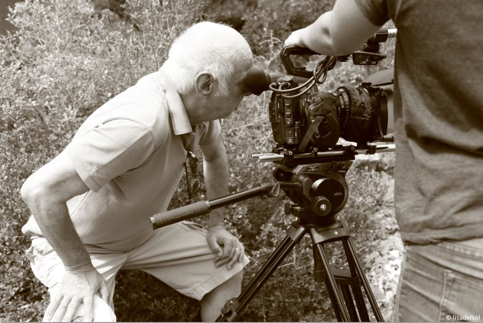 Georges Colleuil _11